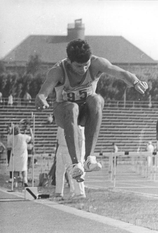 Jörg Drehmel Zentralbild Wendorf-2.8.69 Berlin: XX. Deutsche Leichtathletik-Meisterschaften der DDR im Berliner Friedrich-Ludwig-Jahn-Sportpark. Im Dreisprung holte sich Jörg Drehmel (ASK Vorwärts Potsdam) mit der persönlichen Bestleistung von 16.78 m den DDR-Meistertitel.